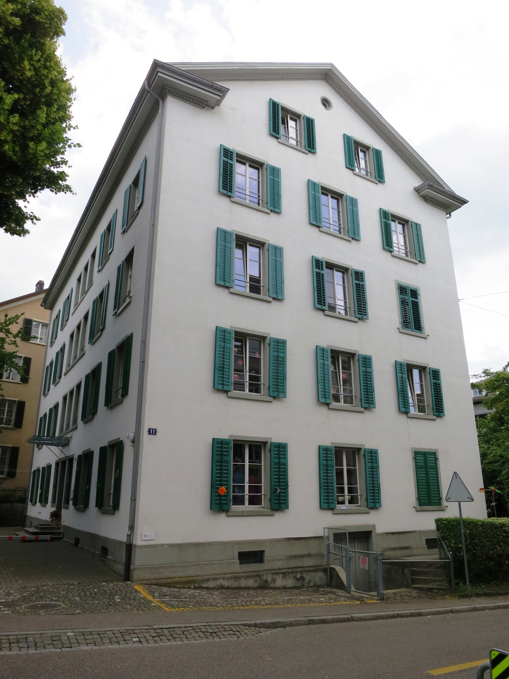 Altersheim Plattenhof, Zürich-Fluntern, Schweiz